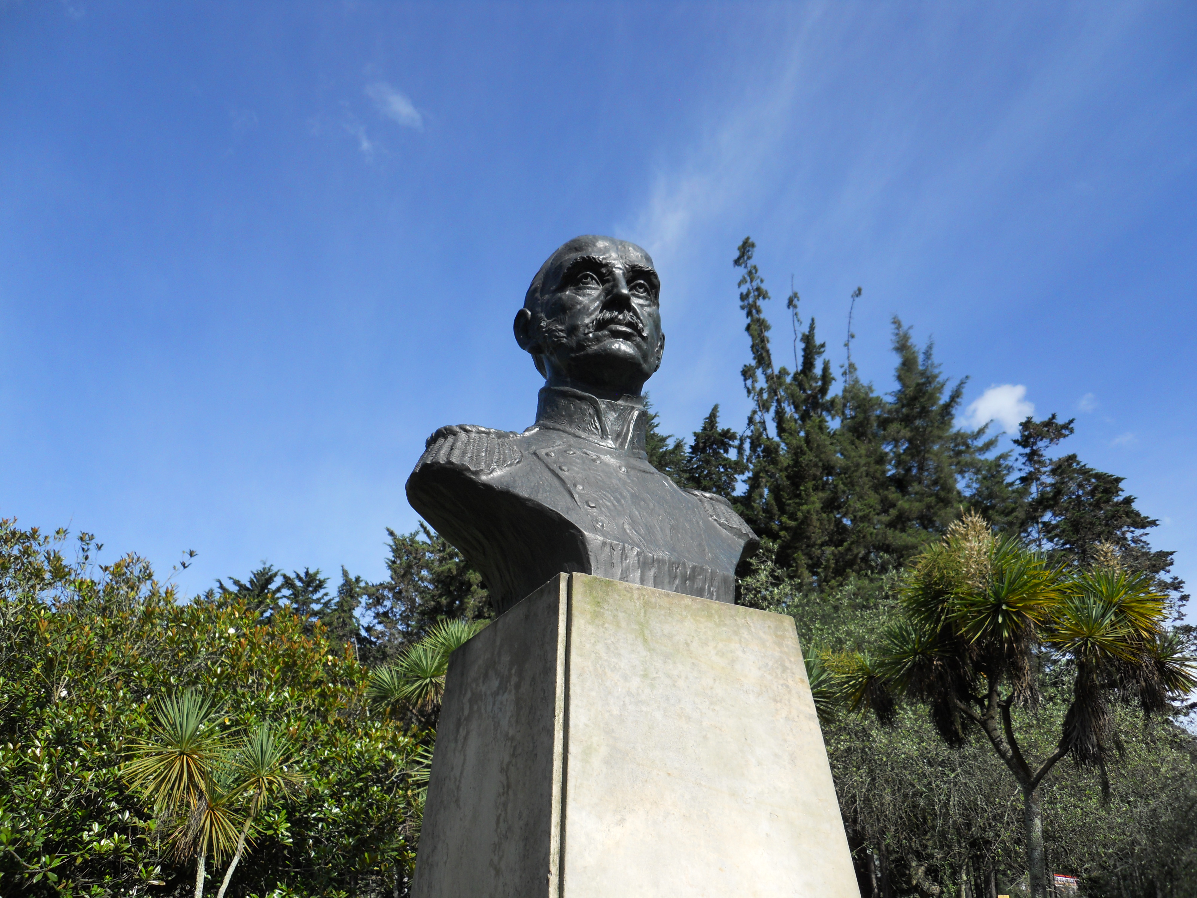 Busto de Pedro Alcántara Herrán en Bogotá.